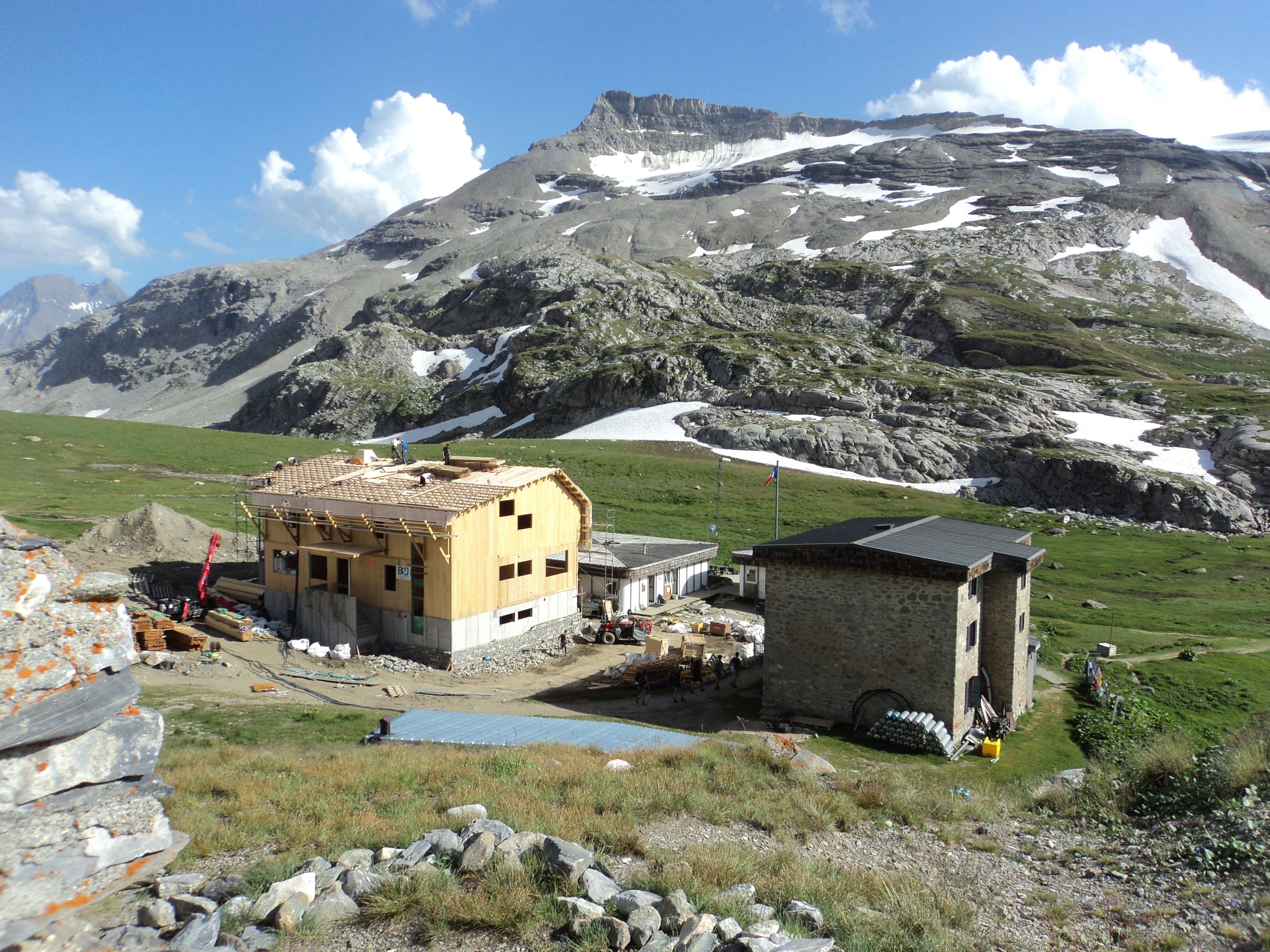 Il Refuge du Col de la Vanoise e sullo sfondo la Pointe de la Rechasse